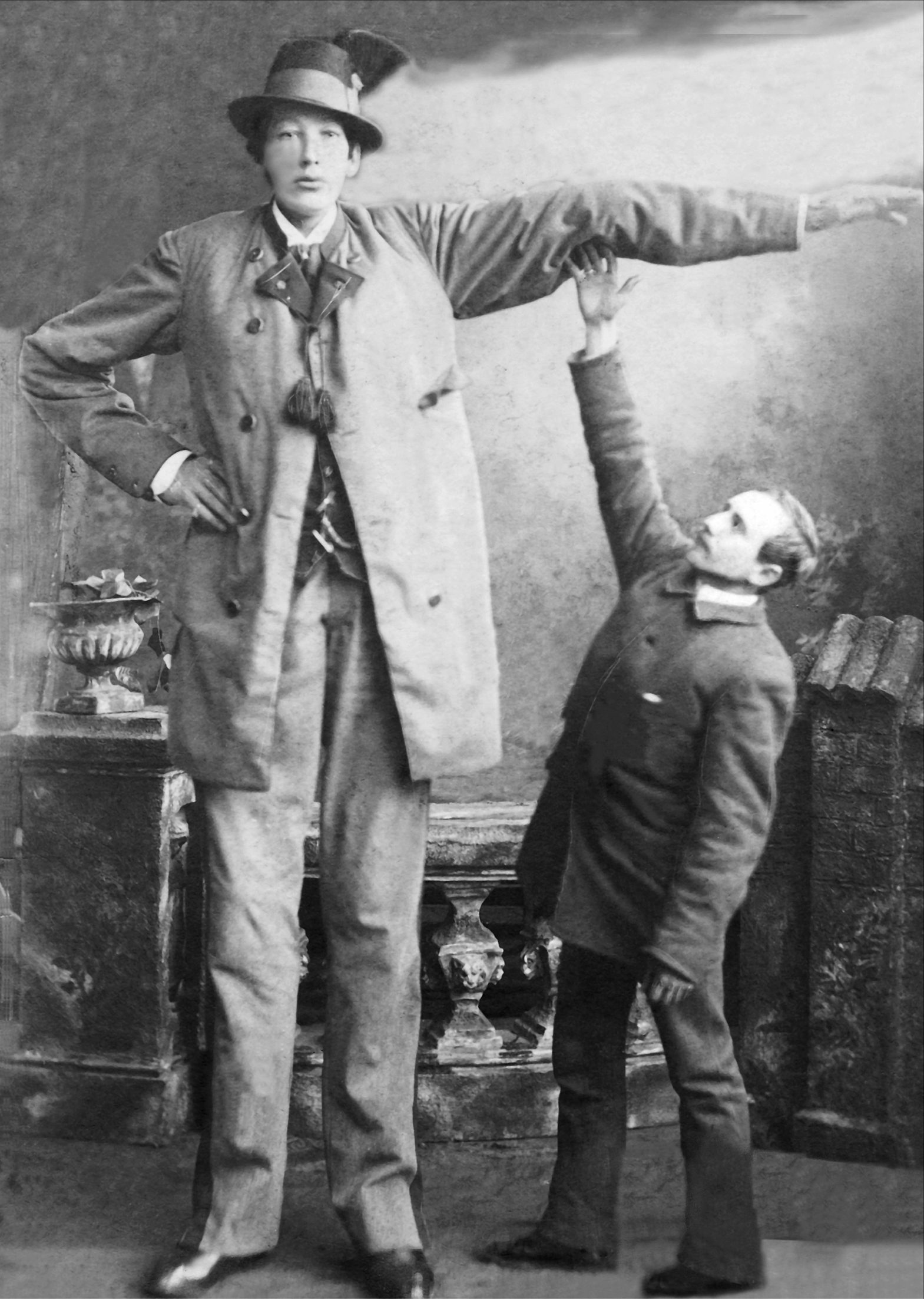 Franz Winkelmeier, the giant from Lengau